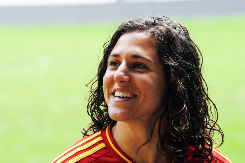 Veronica Boquete